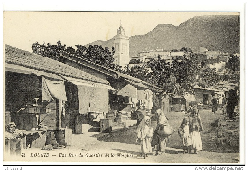 Marché de Béjaïa a coté de la mosquée Sidi Soufi